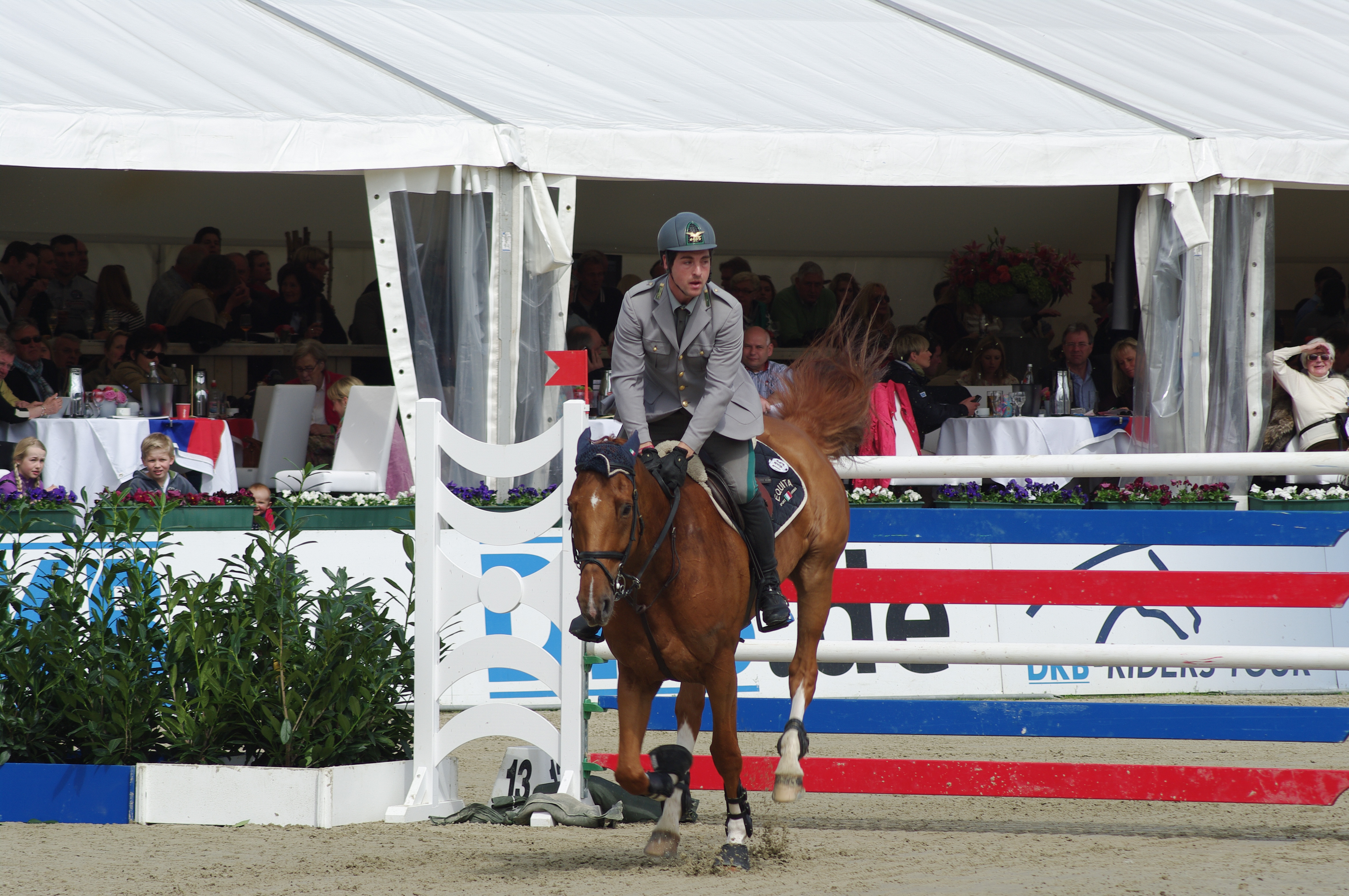 Horses & Dreams 2013: Emanuele Gaudiano mit Chicago 84